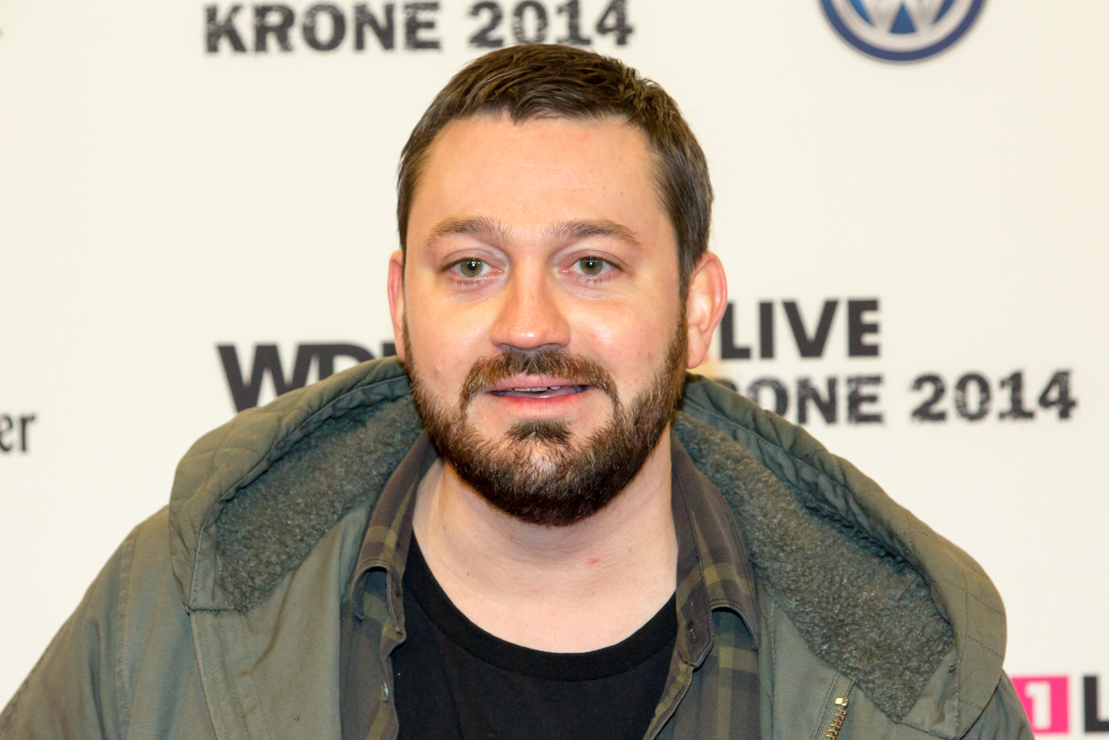 1LIVE Krone 2014 in der Bochumer Jahrhunderthalle: Fritz Kalkbrenner